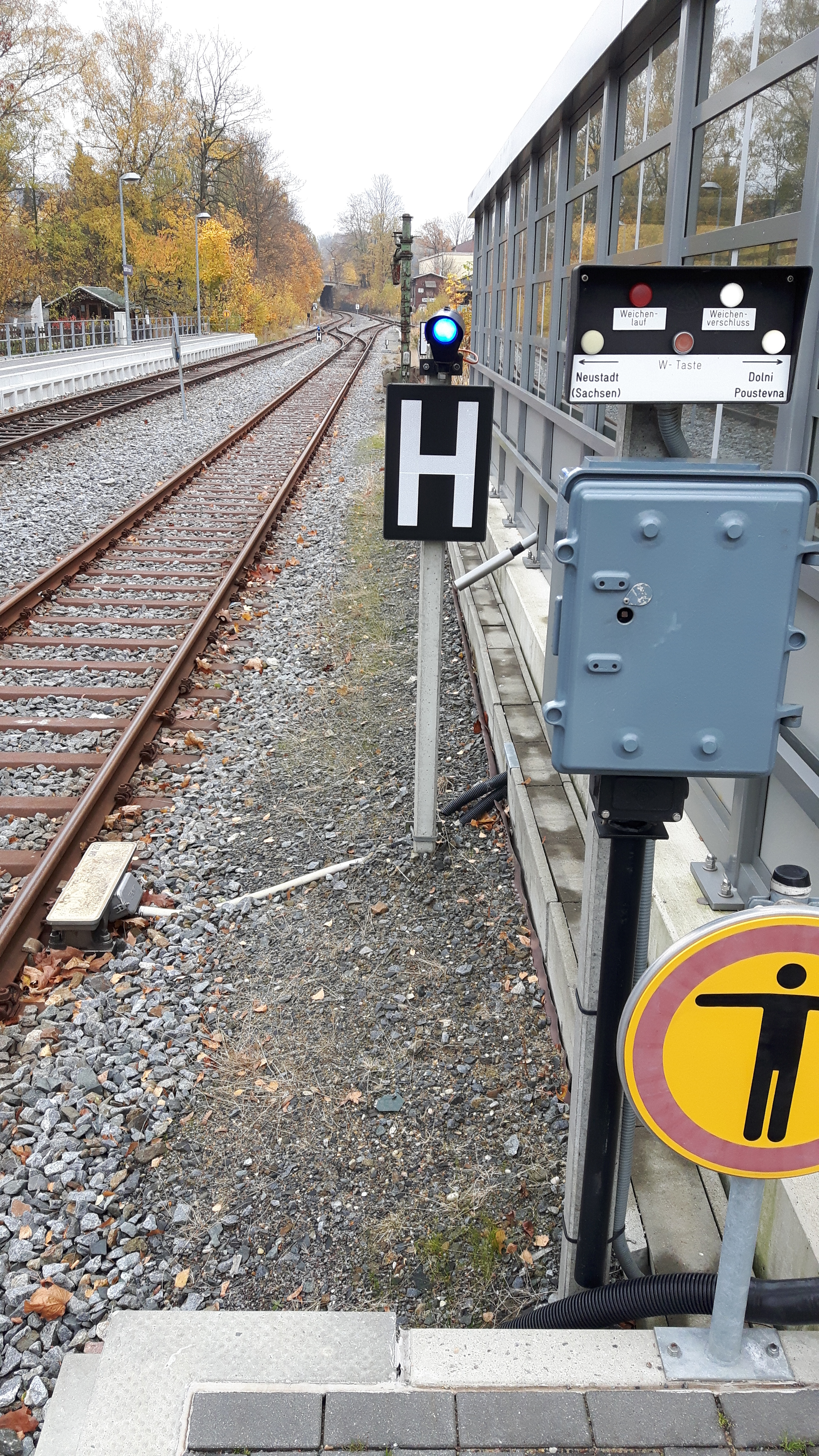 Die Strecke von Sebnitz(Sachs) in Richtung Neustadt(Sachsen) bzw. Dolní Poustevna wird im Zugleitbetrieb mit technischer Unterstützung betrieben (tuZ). Dazu ist der Bahnhof mit schaltbaren 2000-Hz-PZB-Magneten an den H-Tafeln (Ne 5) ausgerüstet. Der Schaltzustand des PZB-Magneten wird durch den blauen Leuchtmelder oberhalb der H-Tafel angezeigt. Der Bahnhof ist mit Rückfallweichen ausgestattet, außer der Weiche, die man im Hintergrund erkennen kann. Diese Weiche ist elektrisch bedienbar, um entweder Richtung Neustadt oder Richtung Dolní Poustevna fahren zu können. Mithilfe des Schaltkastens im Vordergrund kann die Weiche durch den Zugführer umgestellt werden. Der elektrische Antrieb wurde erst mit der Wiedereröffnung der Strecke Richtung Dolní Poustevna eingebaut.